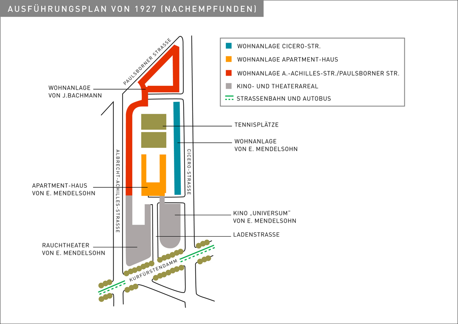 Nachbau des Ausführungsplans des WOGA-Komplex von Erich Mendelsohn von 1927; weitestgehend identisch mit heutigem Zustand